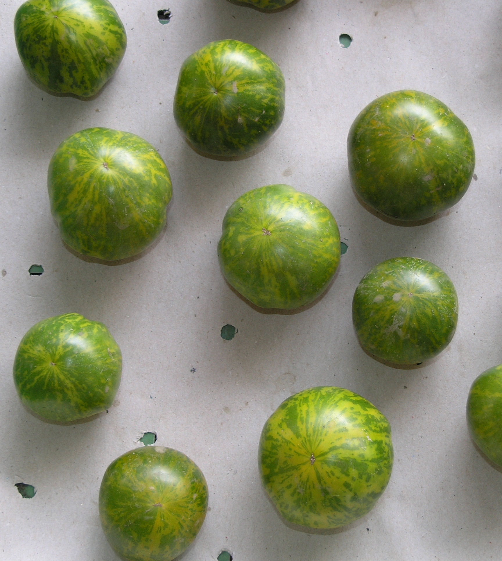 Tomate Zebra grün-gelb gescheckt